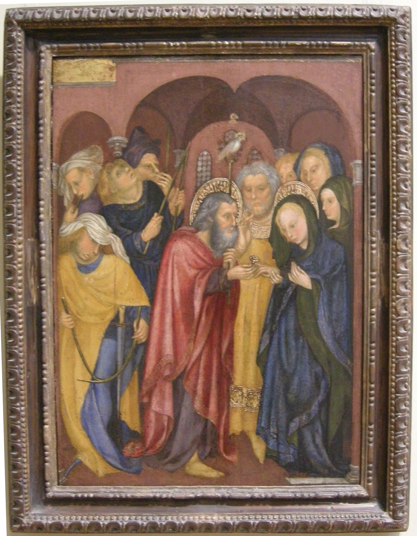 Domenico di michelino, sposalizio della vergine, met